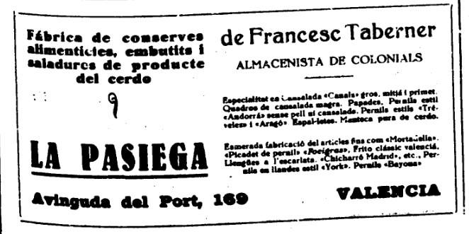 Publicitat de la casa de conserves i saladures "La Pasiega", de l'Avinguda del Port de València